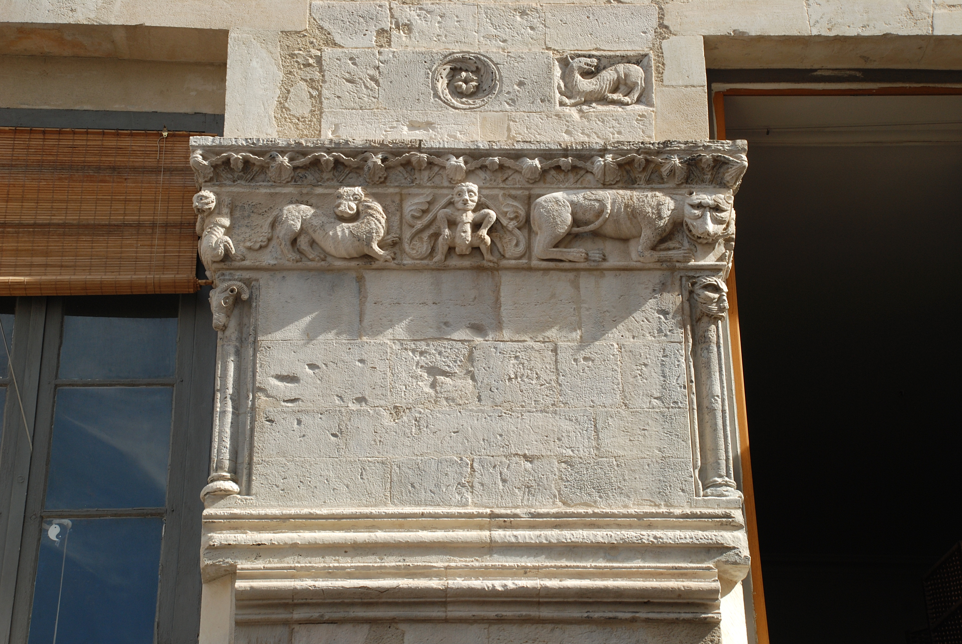 France - Provence - Maison romane de Nîmes